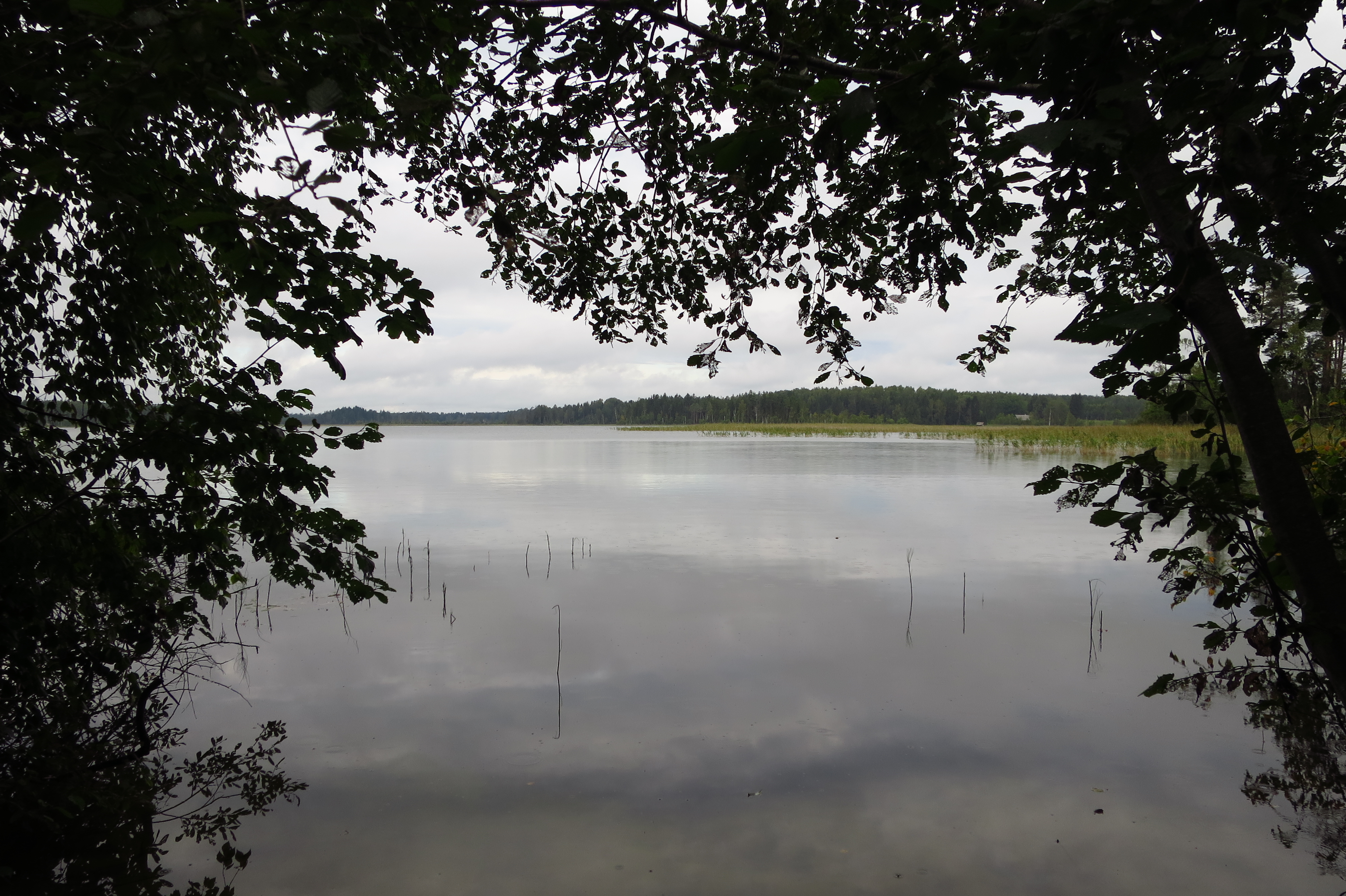 Vaade Hino järvele Hino MKA-l kagukaldalt